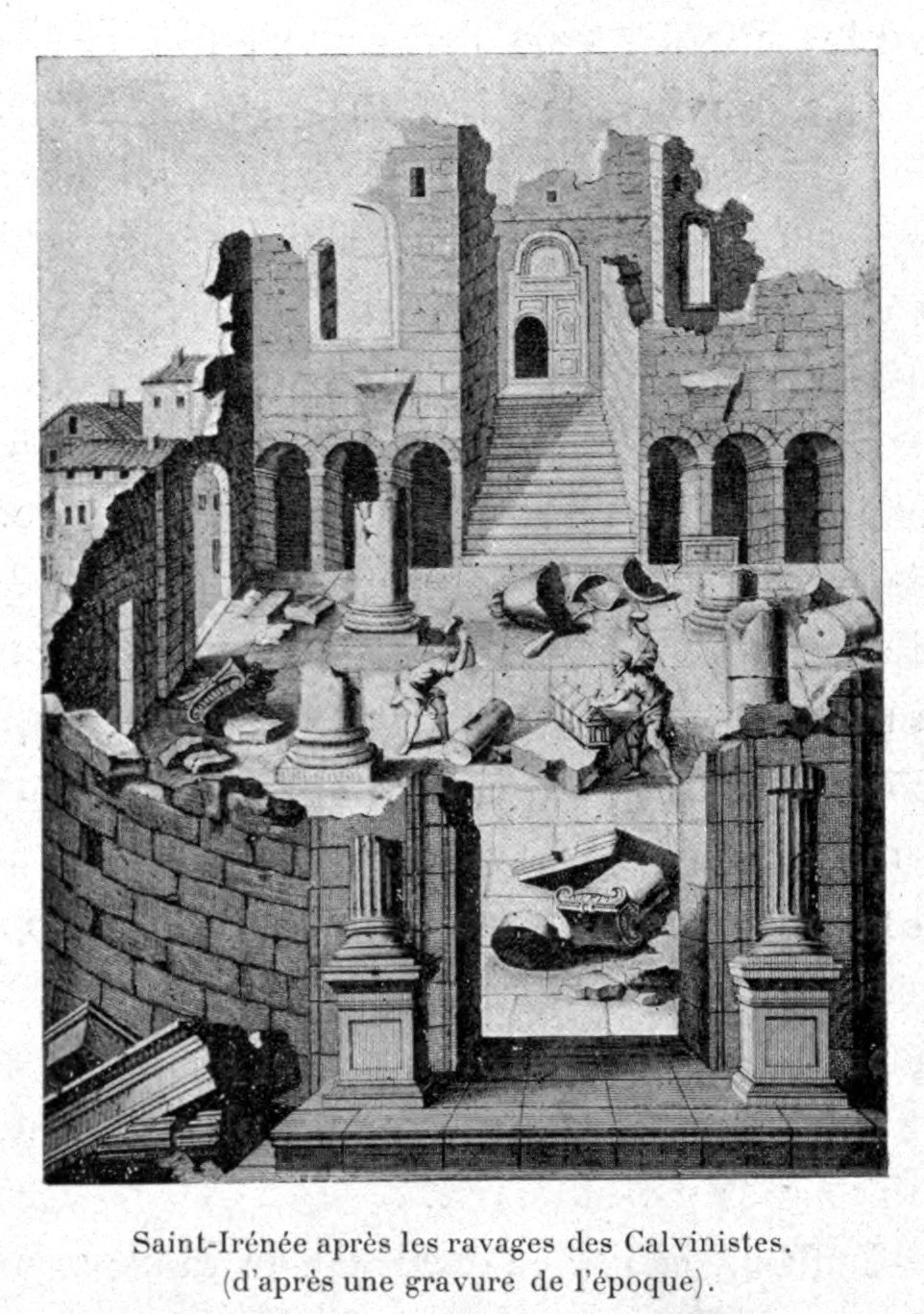 Illustrations pour l'Histoire des églises et chapelles de Lyon